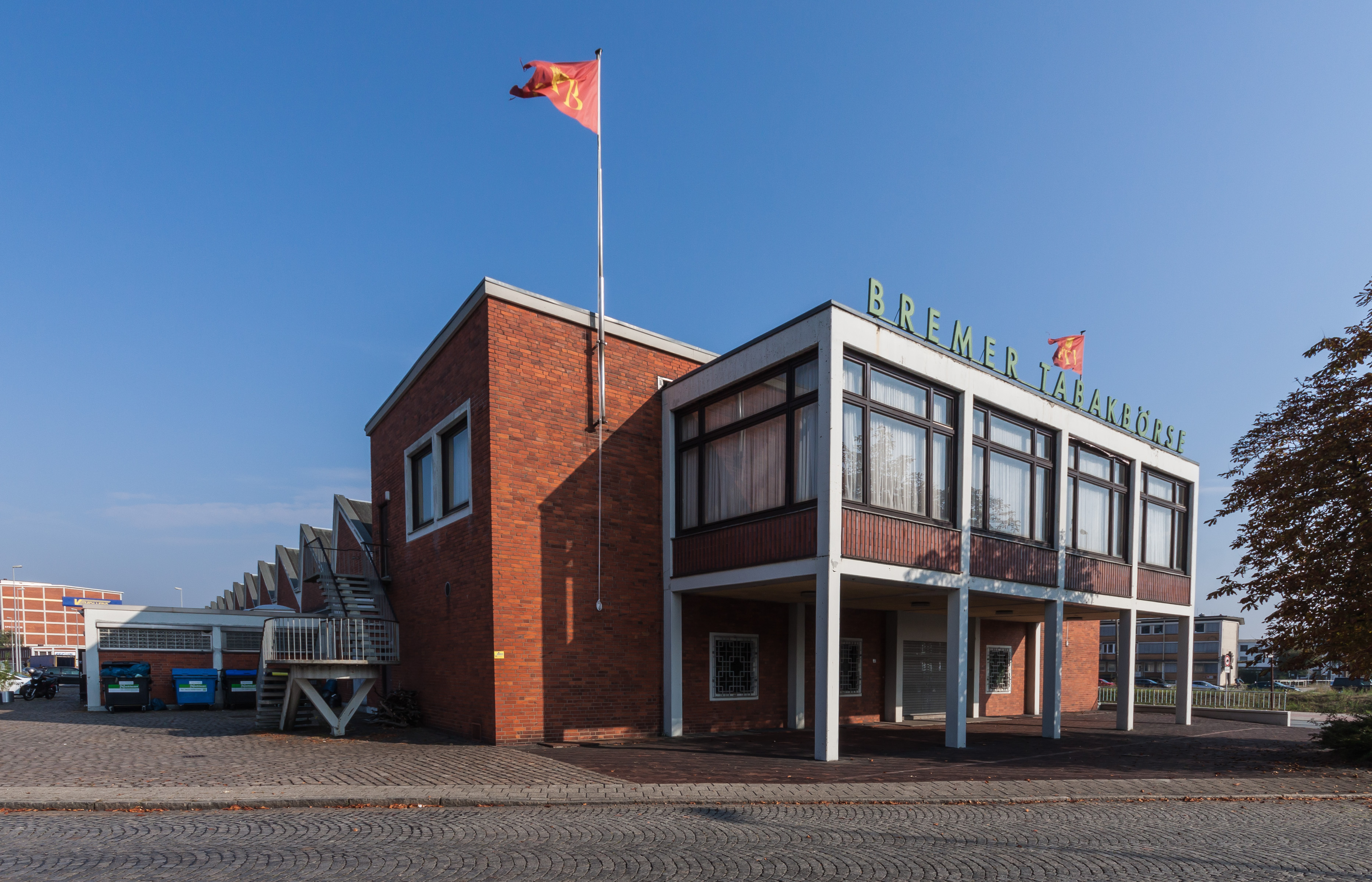 Tabakbörse in Bremen, Speicherhof 1Das abgebildete Objekt ist ein geschütztes Kulturdenkmal in der Freien Hansestadt Bremen, mit der Nr. 3478 beim Landesamt für Denkmalpflege registriert.